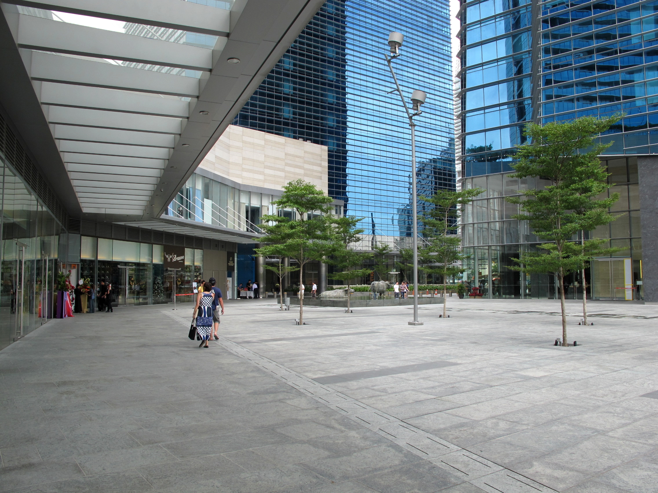 Marina Bay Financial Centre open space